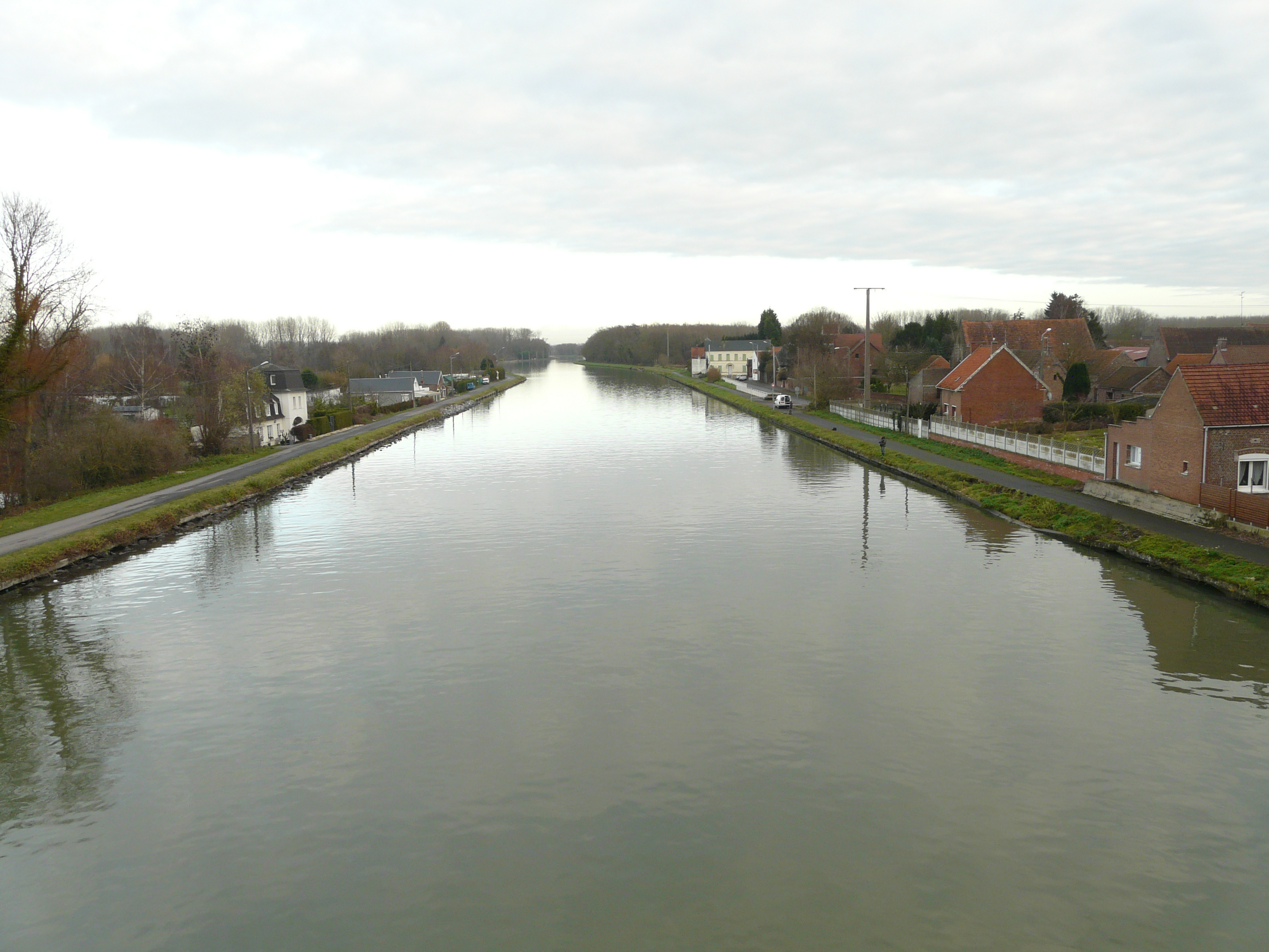 Le canal de la Sensée entre Hem-Lenglet et Féchain